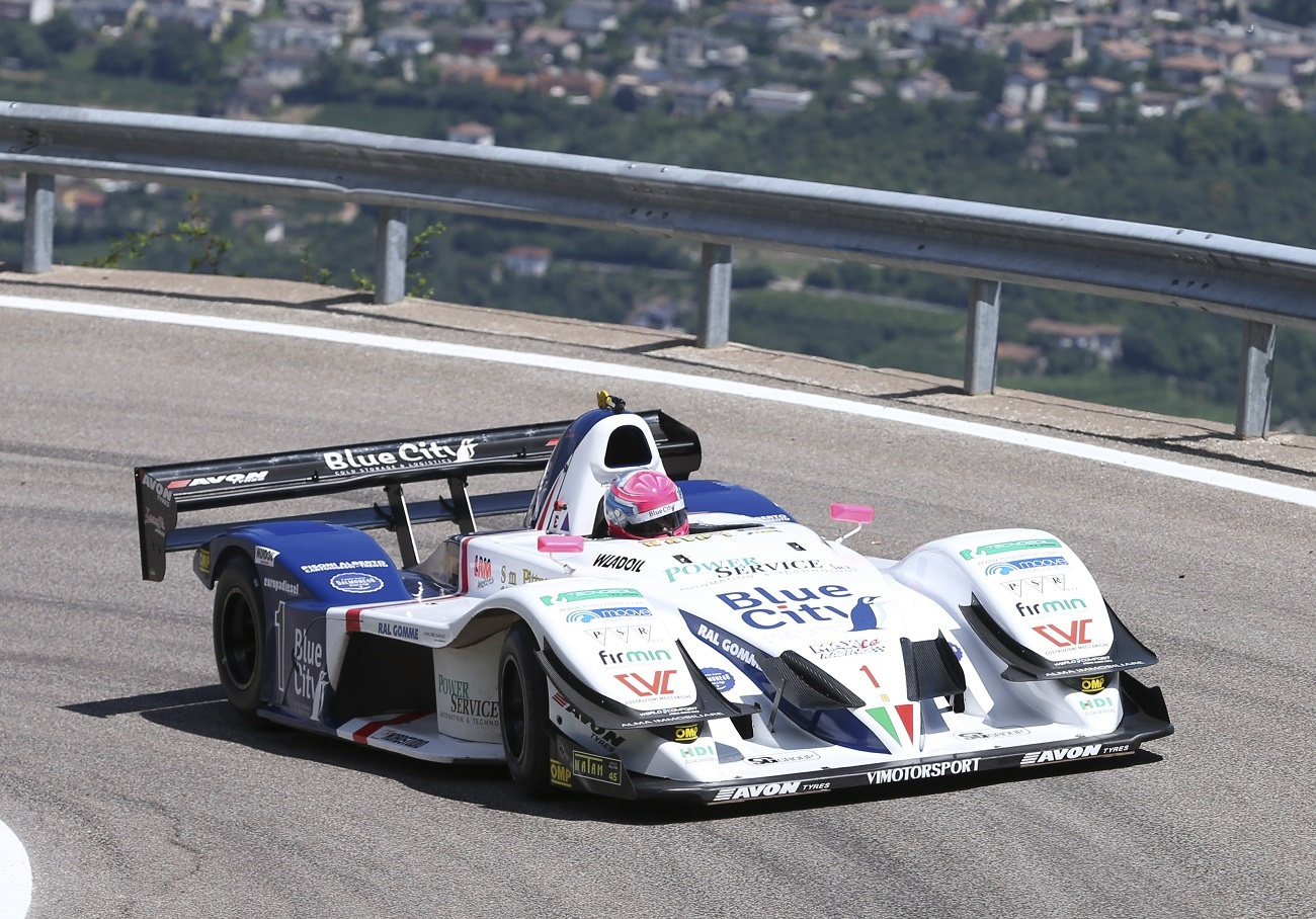 Christian Merli in Azione sulla salita Trento Bondone